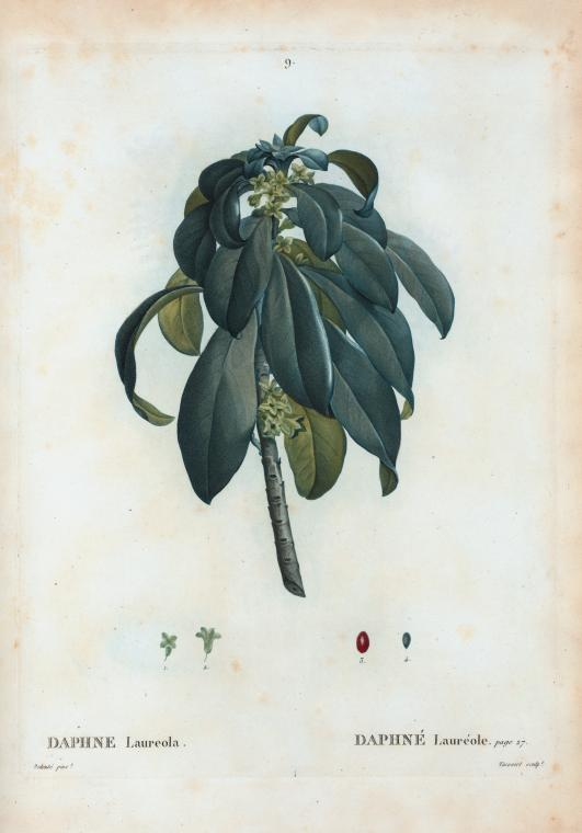 7 v. : 498 col. pl. ; 42 cm.